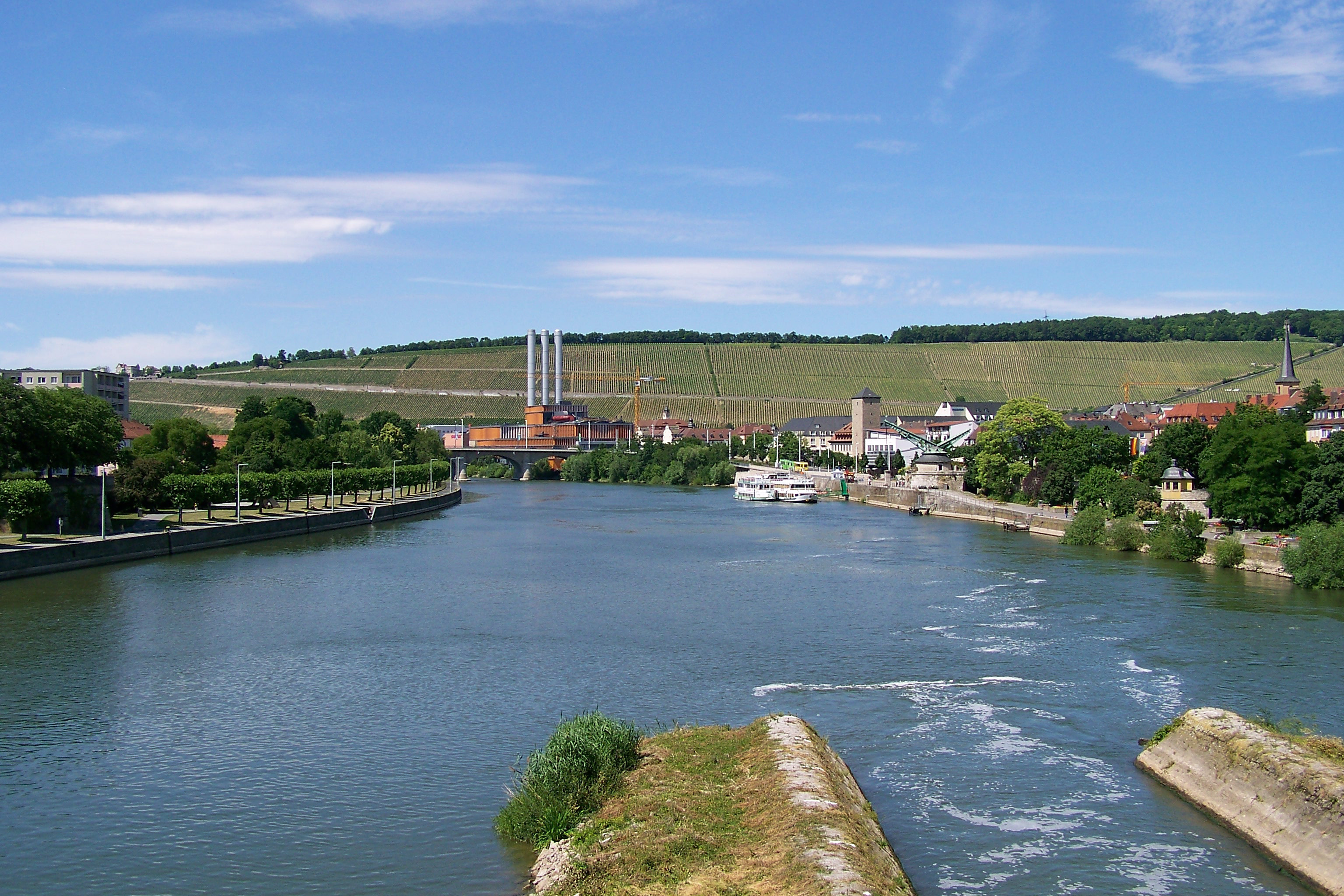 Blick mainabwärts von der Alten Mainbrücke in Würzburg.